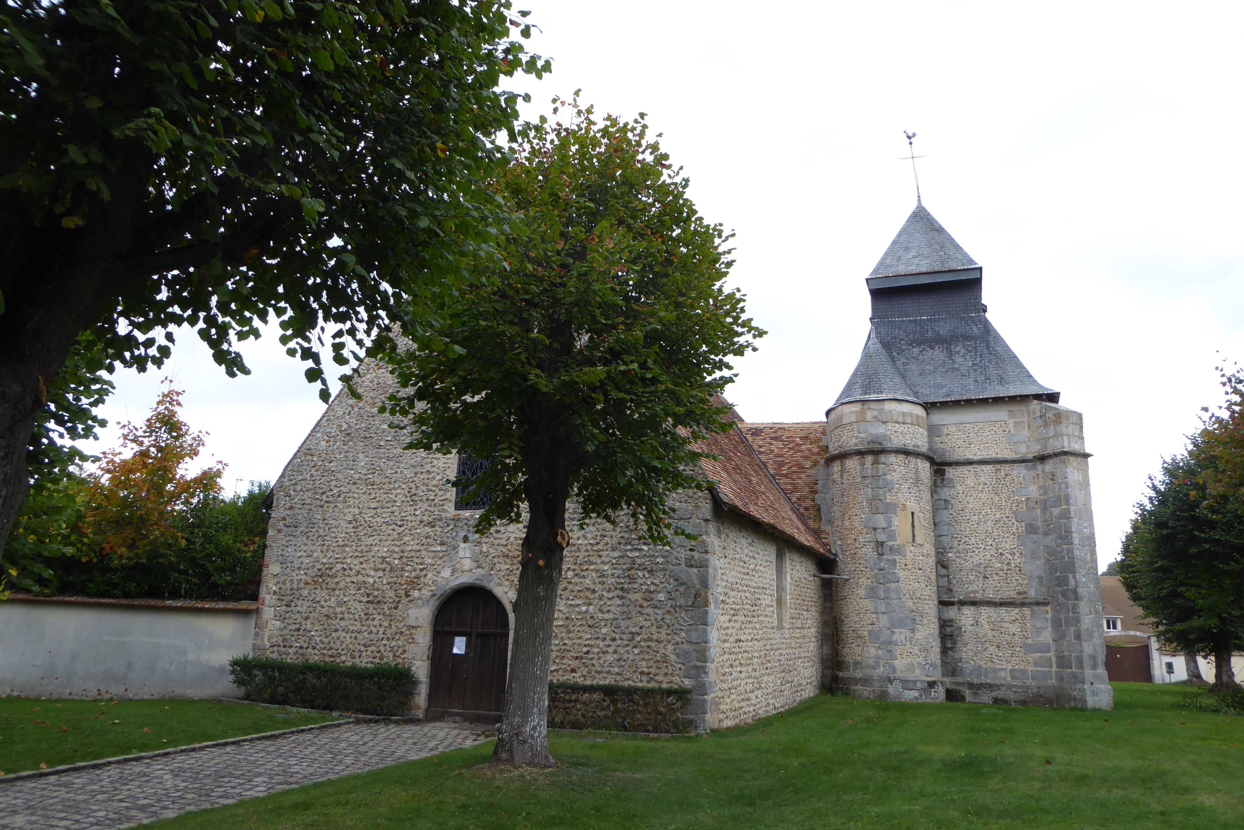 façades sud et ouest de l'église Saint-Hilaire, Charpont, Eure-et-Loir, France.